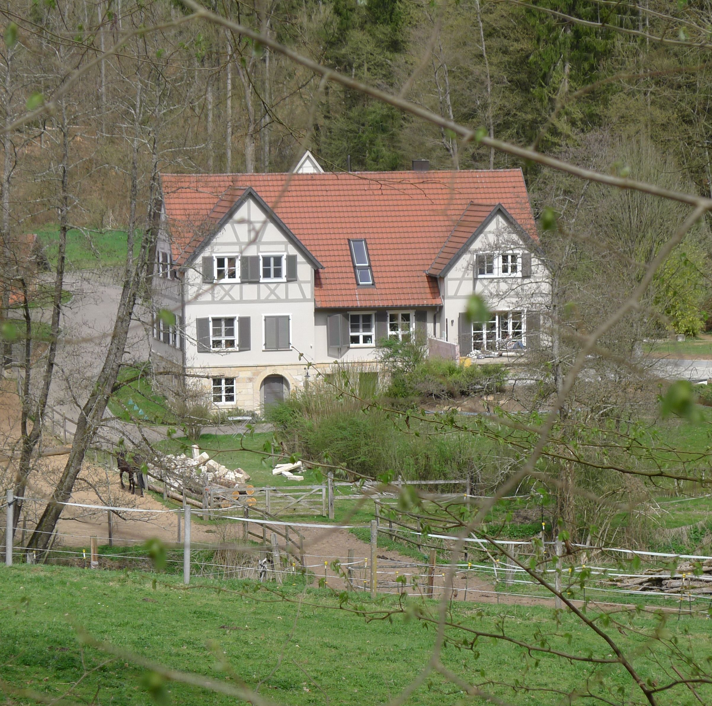 De Walzenmühle in het Siebenmühlental (Stuttgart) gezien van het Bondswandelpad